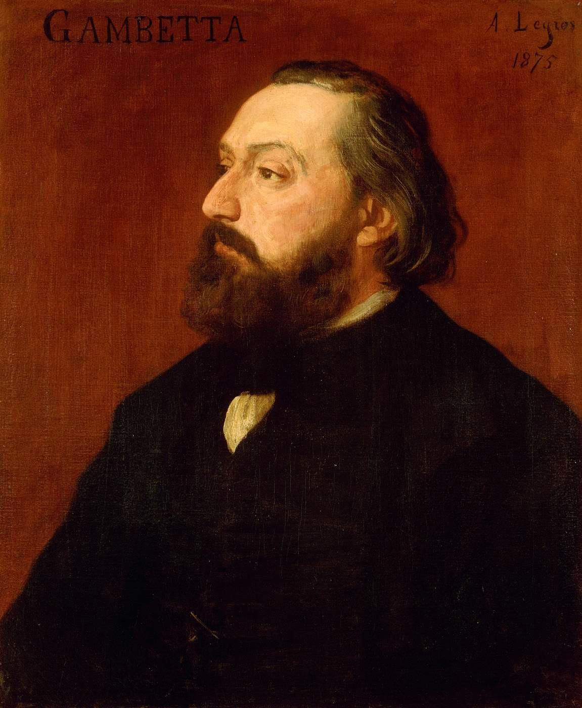 Portrait de Léon Gambetta (1838-1882)